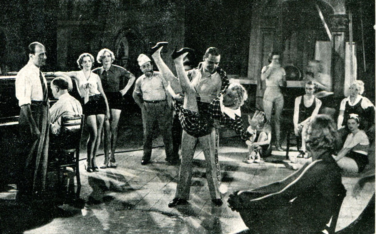 Kiki film del 1934 diretto da Raffaello Matarazzo - foto scena